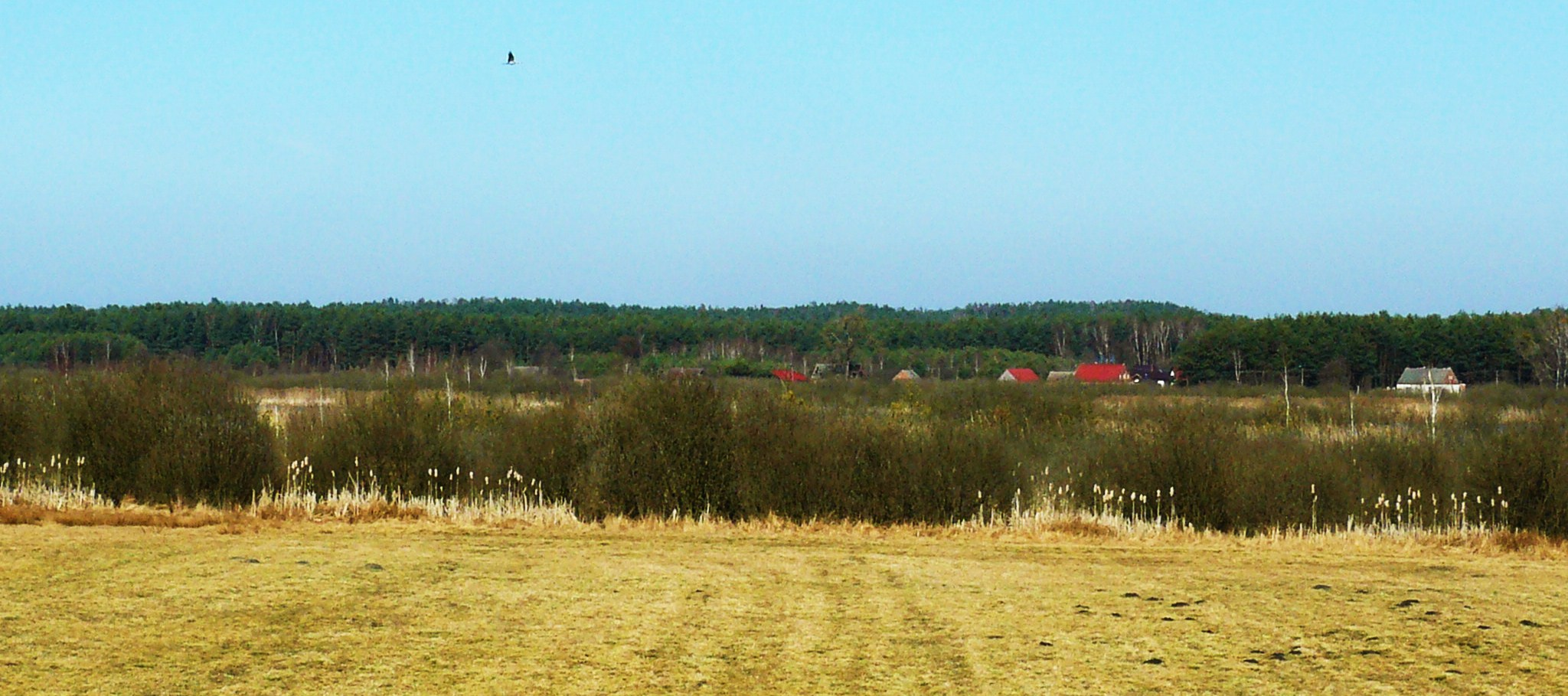 Jez. Rzecińskie.